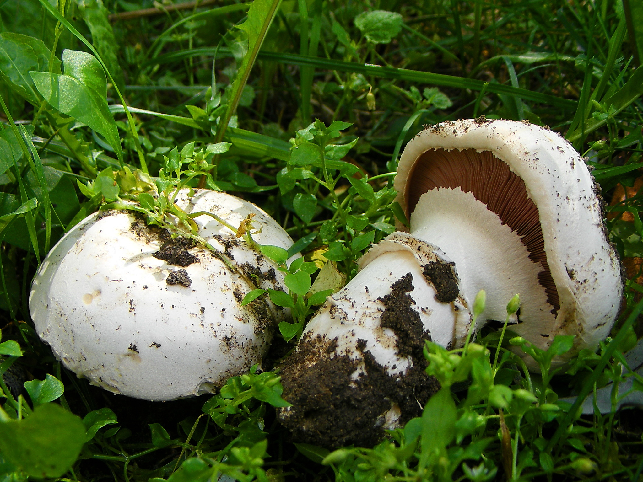 Agaricus bitorquis specimens.